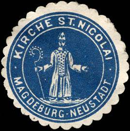 Sealing stamp Title: Kirche St. Nicolai - Magdeburg - Neustadt Description: blau, weiß Place: Magdeburg size: 3 cm